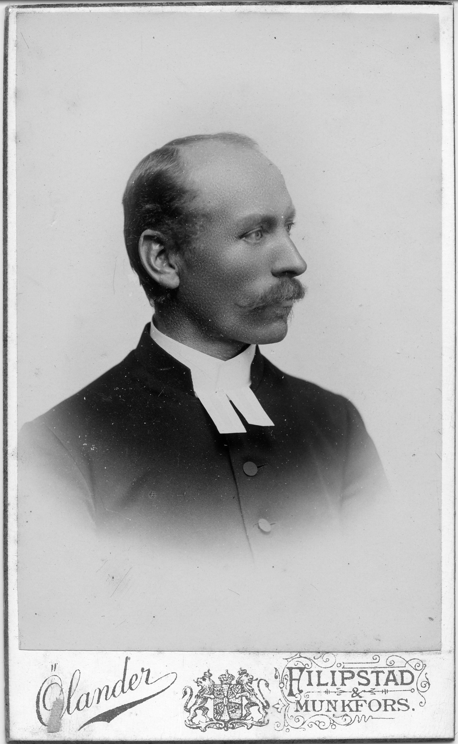 Carl Vilhelm Bromander under tiden som kyrkoherde i Ölme